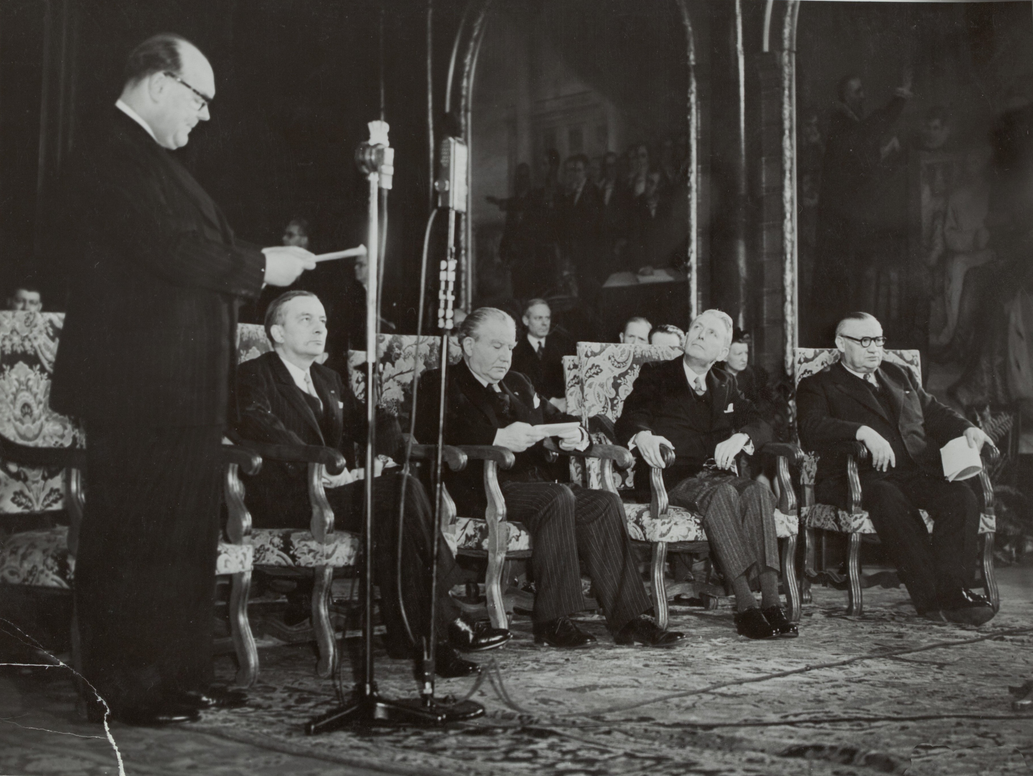 Collectie / Archief : Fotocollectie Rijksvoorlichtingsdienst Eigen Reportage / Serie : [ onbekend ] Beschrijving : ministers, verdragen, Bech, Bevin, Bidault, Boetzelaer van, Brussel, Pact van Datum : 17 maart 1948 Locatie : Brussel Trefwoorden : ministers, verdragen Persoonsnaam : Bech, Bevin, Bidault, Boetzelaer van, Brussel, Pact van Fotograaf : Fotograaf Onbekend / Anefo Auteursrechthebbende : Nationaal Archief Materiaalsoort : Foto (zwart/wit) Nummer archiefinventaris : bekijk toegang 2.24.10.02 Bestanddeelnummer : 136-0522